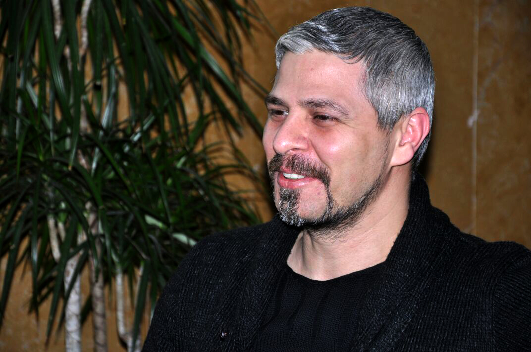 Cenk Enes Özer 2015-1